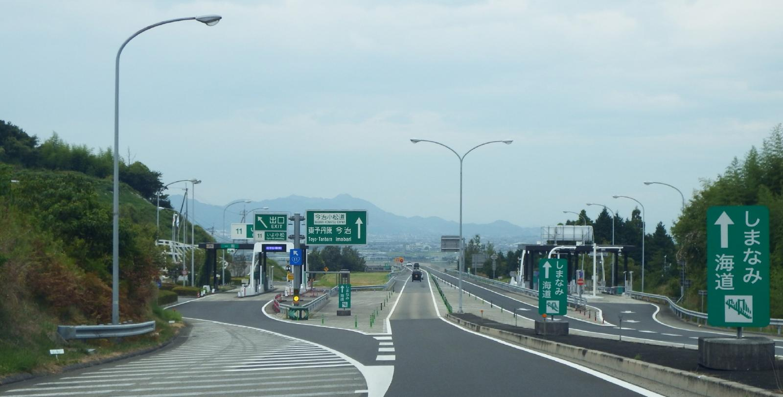 伊予小松インターチェンジ出口